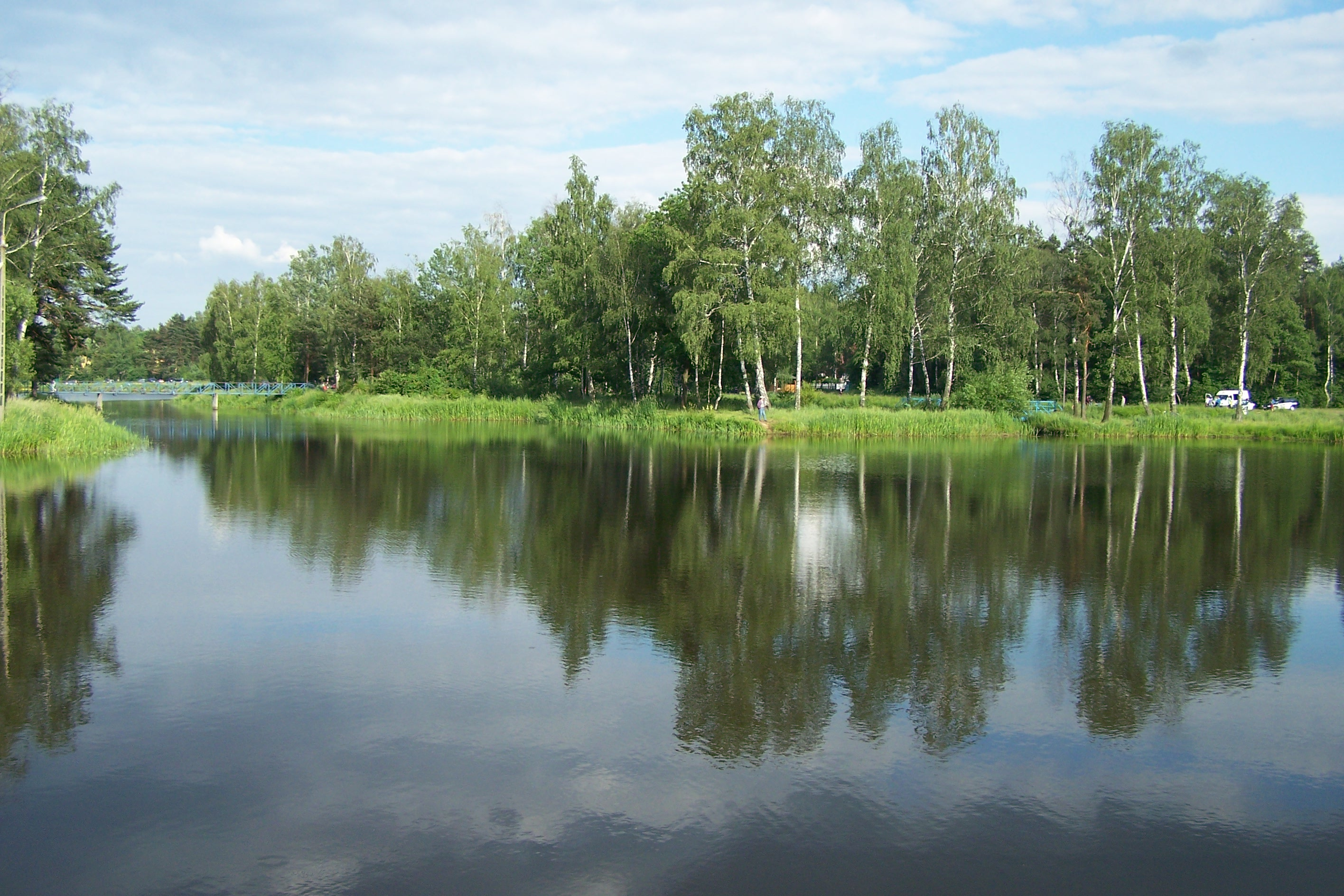 Zdjęcie prezentuje zalew w Kamionce (na rzece Tuszymka) od strony nowowybudowanej zapory.